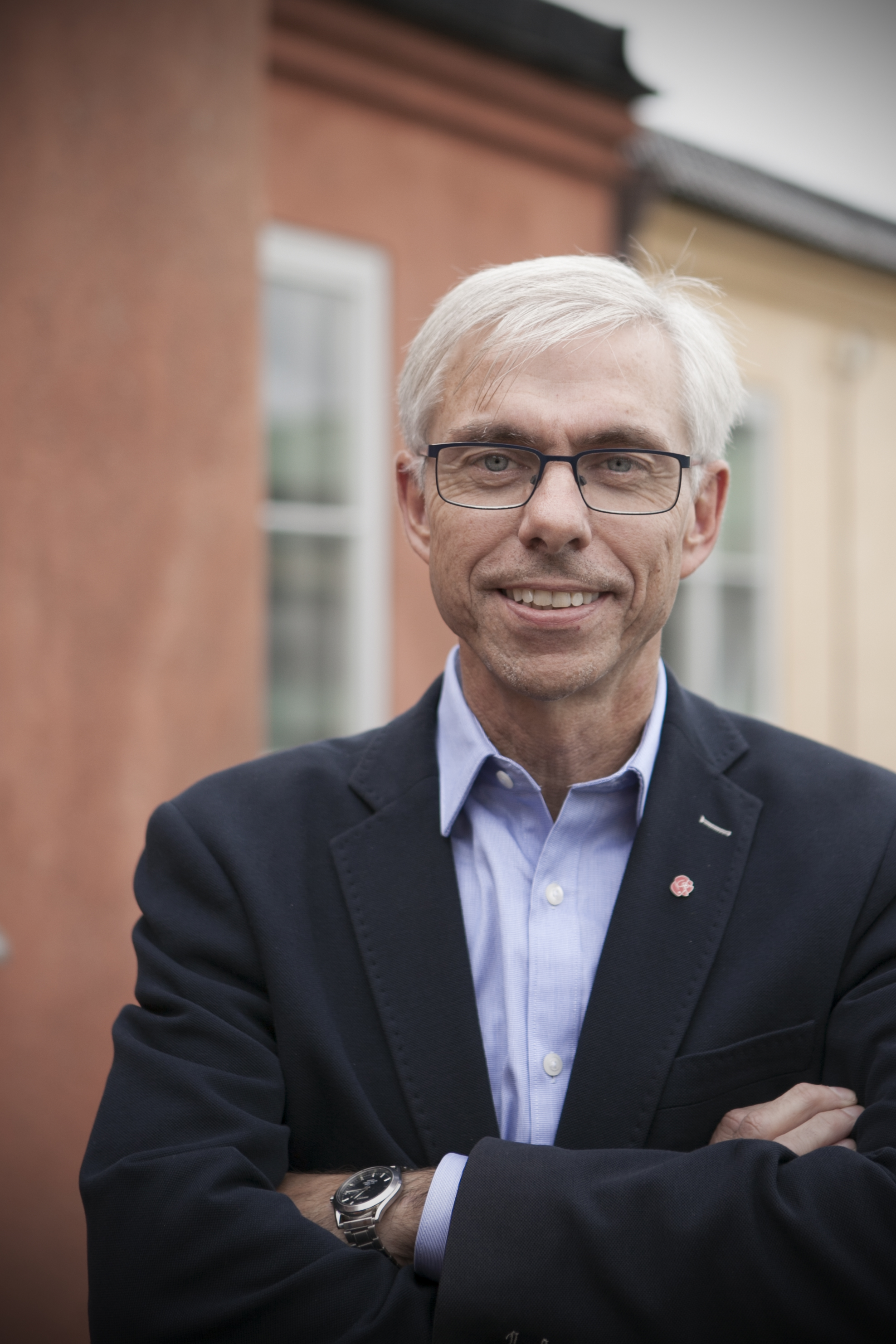 Mats Wiking, riksdagsledamot (S)